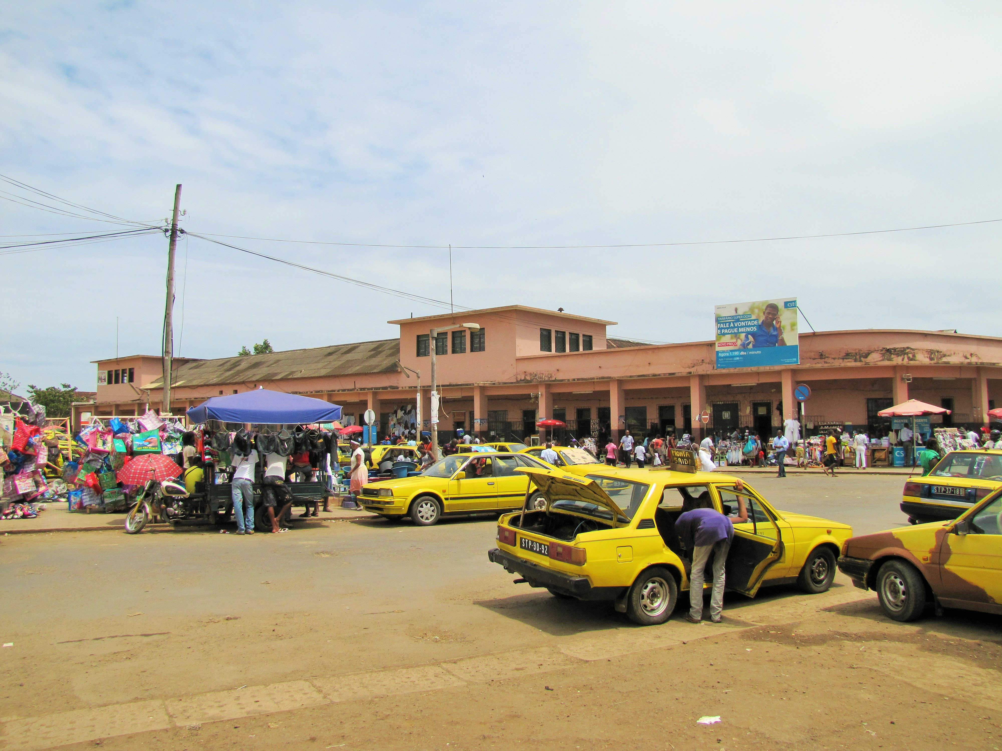 Market of São Tomé. Mercado Municipal / Mercado Velho de São Tomé. IPA.00033345. São Tomé e Príncipe, Ilha São Tomé, Água Grande, Água Grande